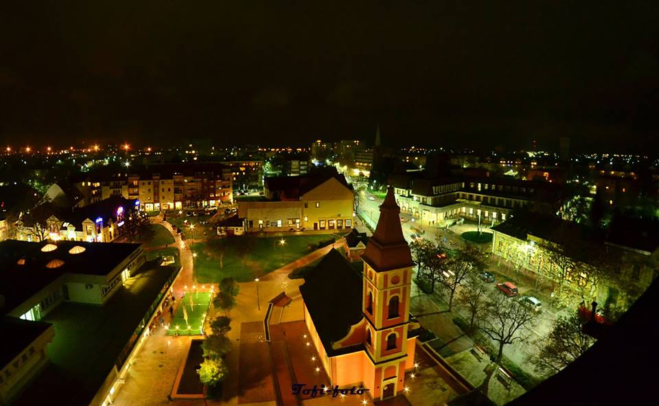 Fotó: Tofán Sándor